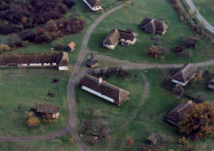 Skanzen - Szentendre - Hungary - Europe